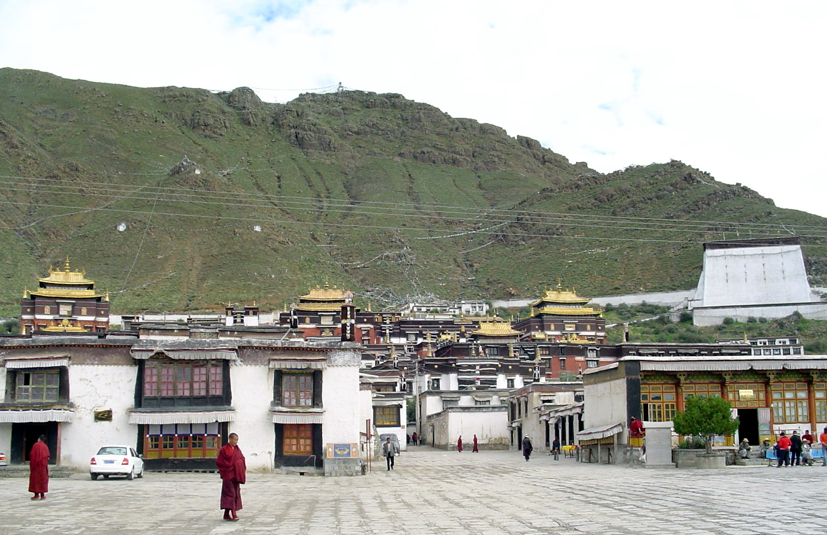 Монастырь ТашилумпоМонастырь Ташилумпо в Шигатсе, Тибет